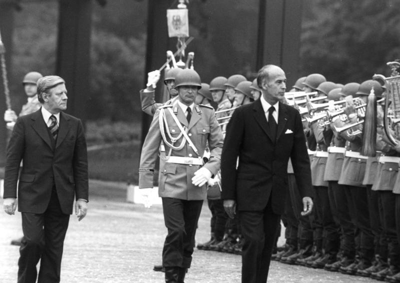 Am 16. und 17. Juni 1977 fand in Bonn das 30. deutsch-französische Gipfeltreffen statt. Hauptgesprächsthemen dieser Konsultationen waren internationale Wirtschafts- und Währungsprobleme, Energiefragen sowie zahlreiche Probleme auf dem Gebiet der Europapolitik. Am 16. Juni unterzeichneten die beiden Außenminister ein Abkommen über die Gleichwertigkeit von Prüfungszeugnissen in der beruflichen Bildung. Am 17. Juni nahmen Bundeskanzler Helmut Schmidt und der französische Staatspräsident Valéry Giscard d'Estaing in Mainz an einer Feier aus Anlaß des 500jährigen Bestehens der Universität Mainz teil. Ankunft am Bundeskanzleramt Bundeskanzler Schmidt und Staatspräsident Giscard d'Estaing (v.l.n.r.) schreiten die Ehrenformation ab